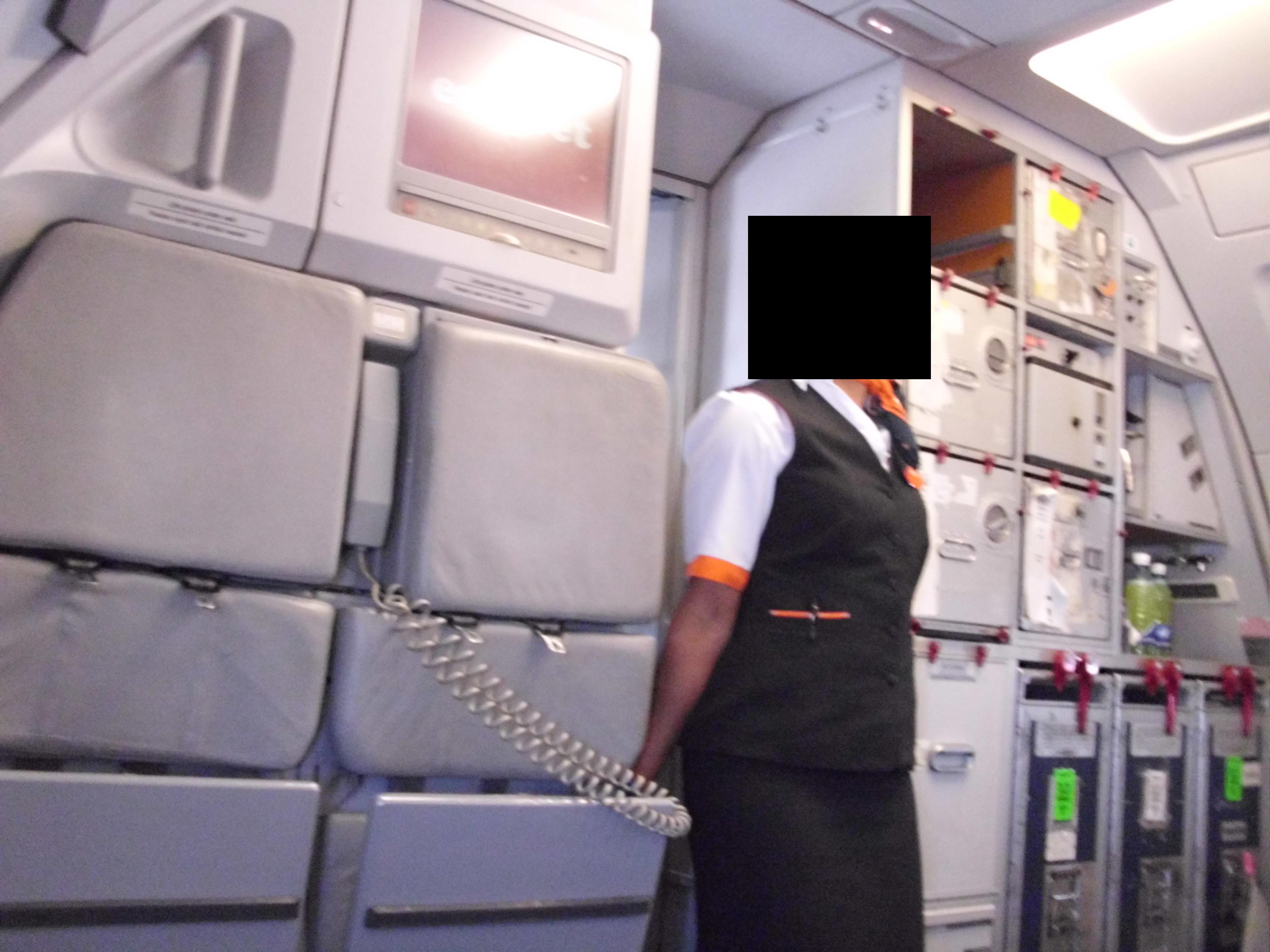 Flugbegleiterin sichert offenes Cockpit einer easyJet-Maschine von London Gatwick nach München